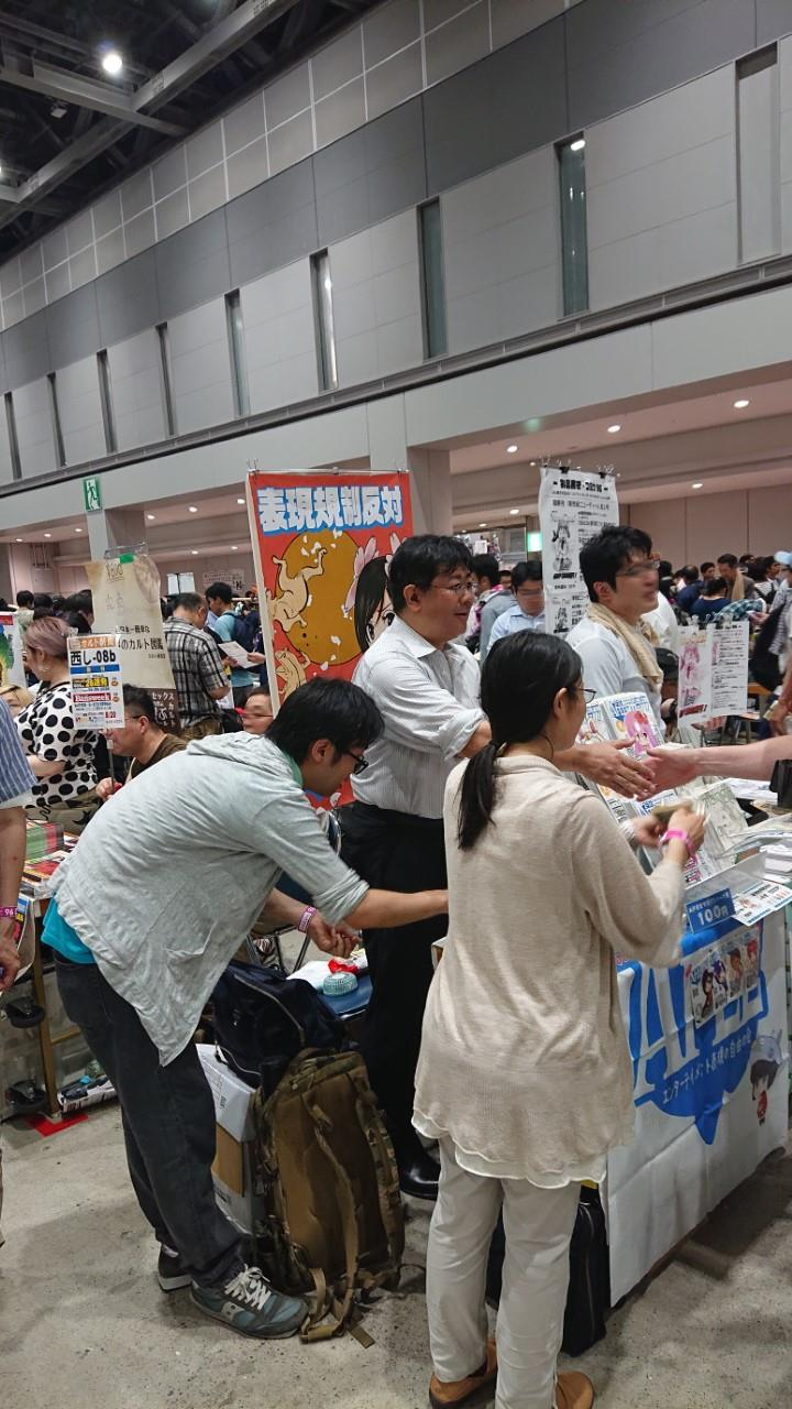 売り子をする山田太郎、コミックマーケット96の東京国際展示場にて